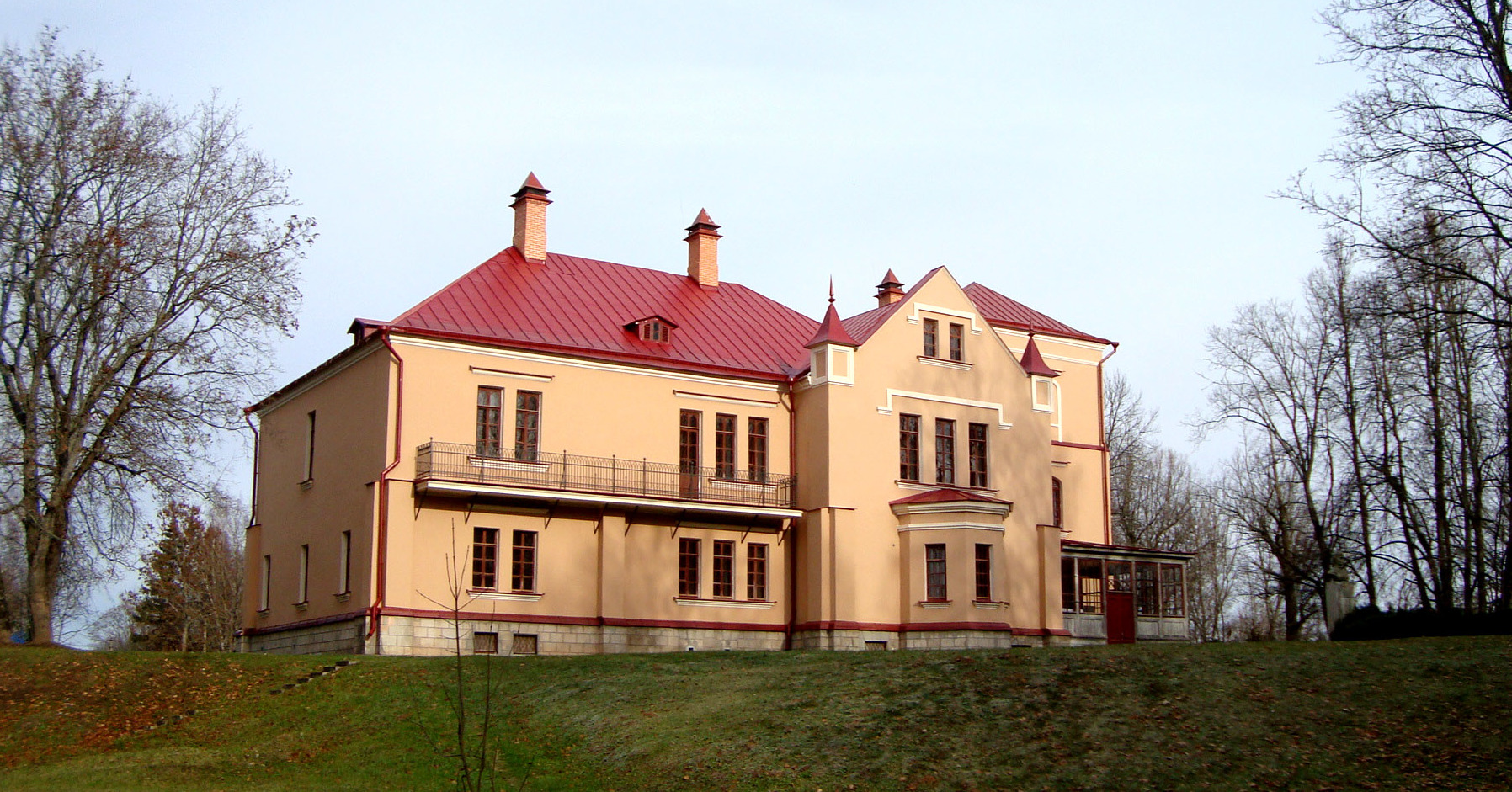 дом усадебный (Псковская область, Великие Луки, деревня Полибино)